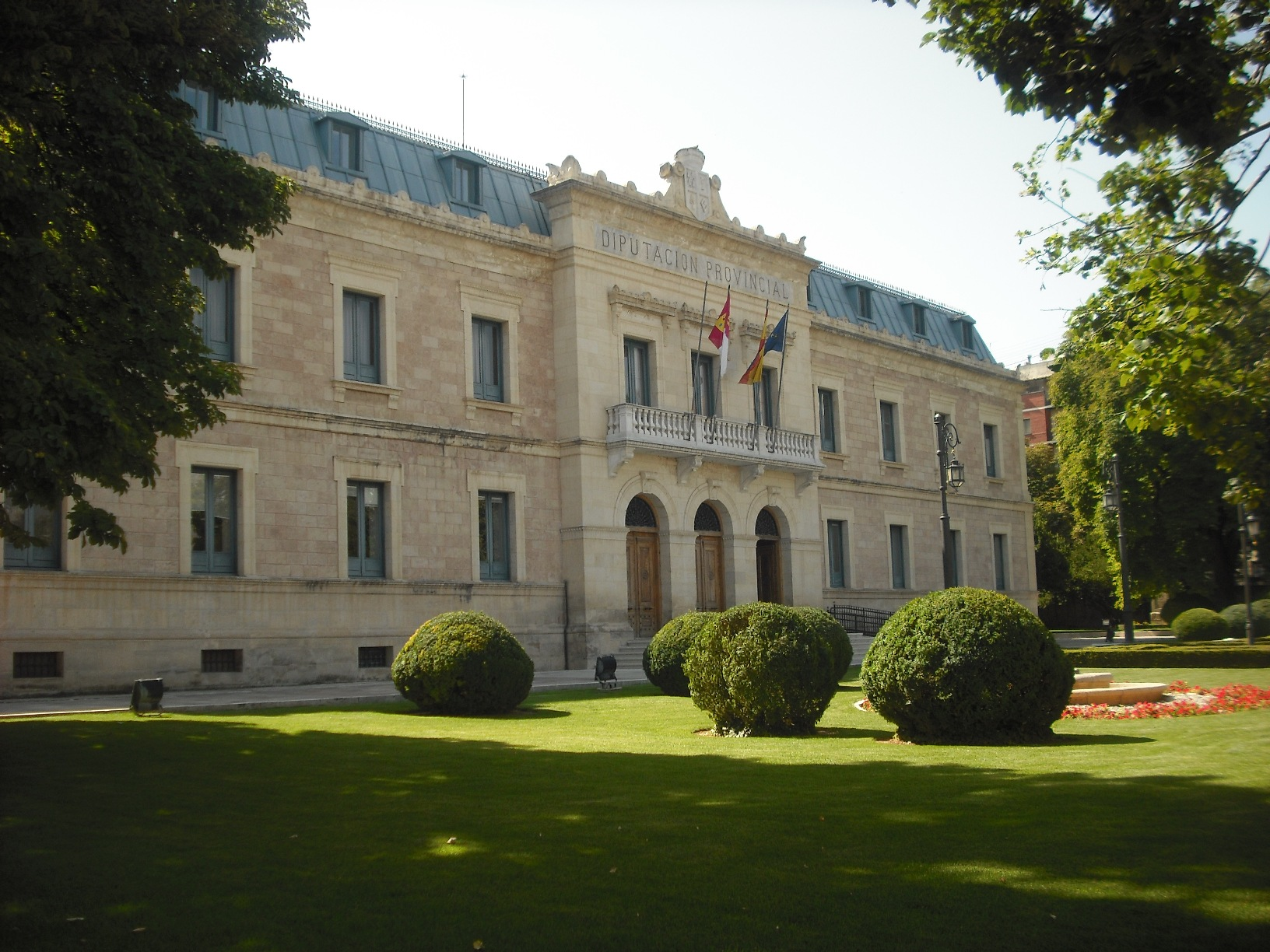 Diputación Provincial de Cuenca.